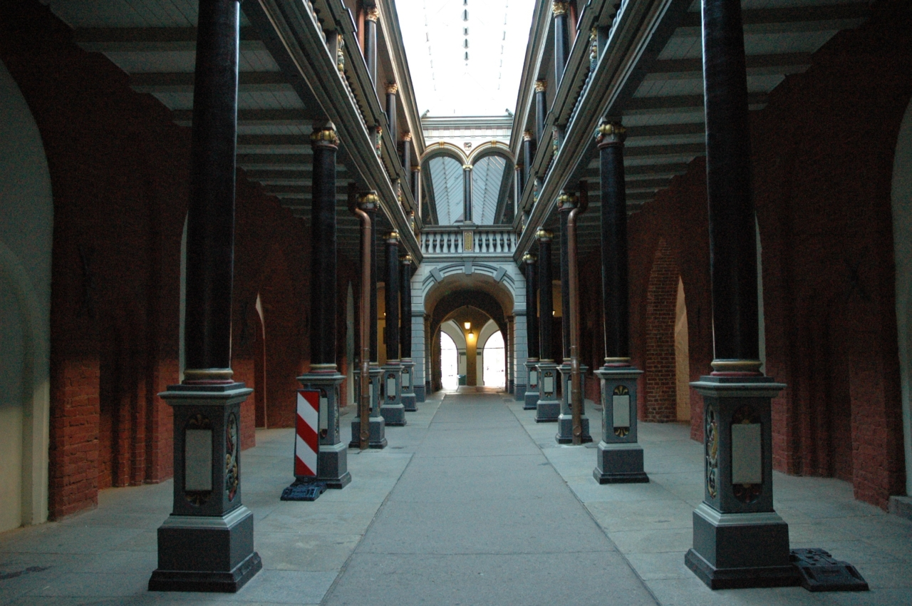 Stralsund - Innenhof des Rathauses fotografiert von harald909 am 14.08.2004 GNU-FDL